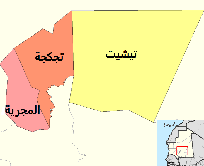 خريطة بيانية لمقاطعات ولاية تكانت في موريتانيا